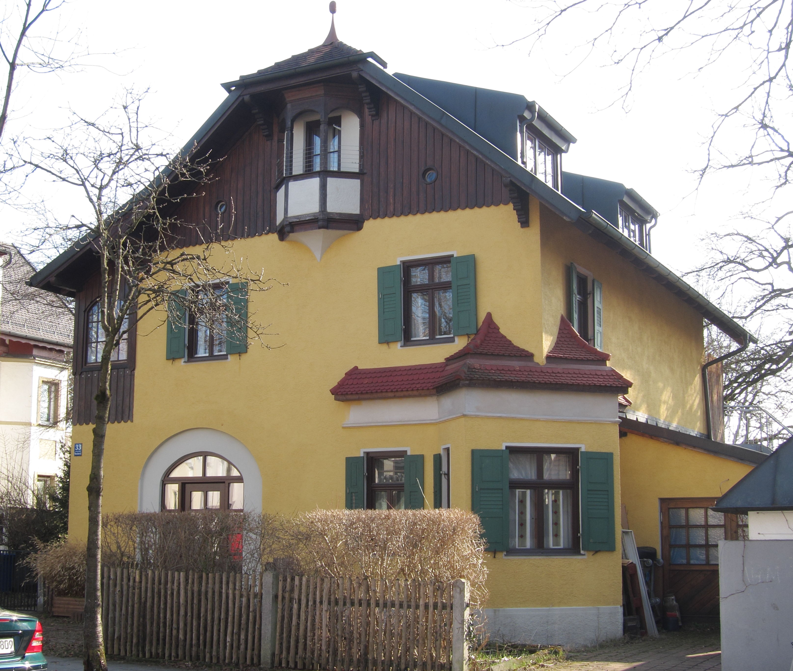 Marschnerstraße 33; Malerische Villa, Landhausstil, um 1897/1900, aus dem Büro August Exter.